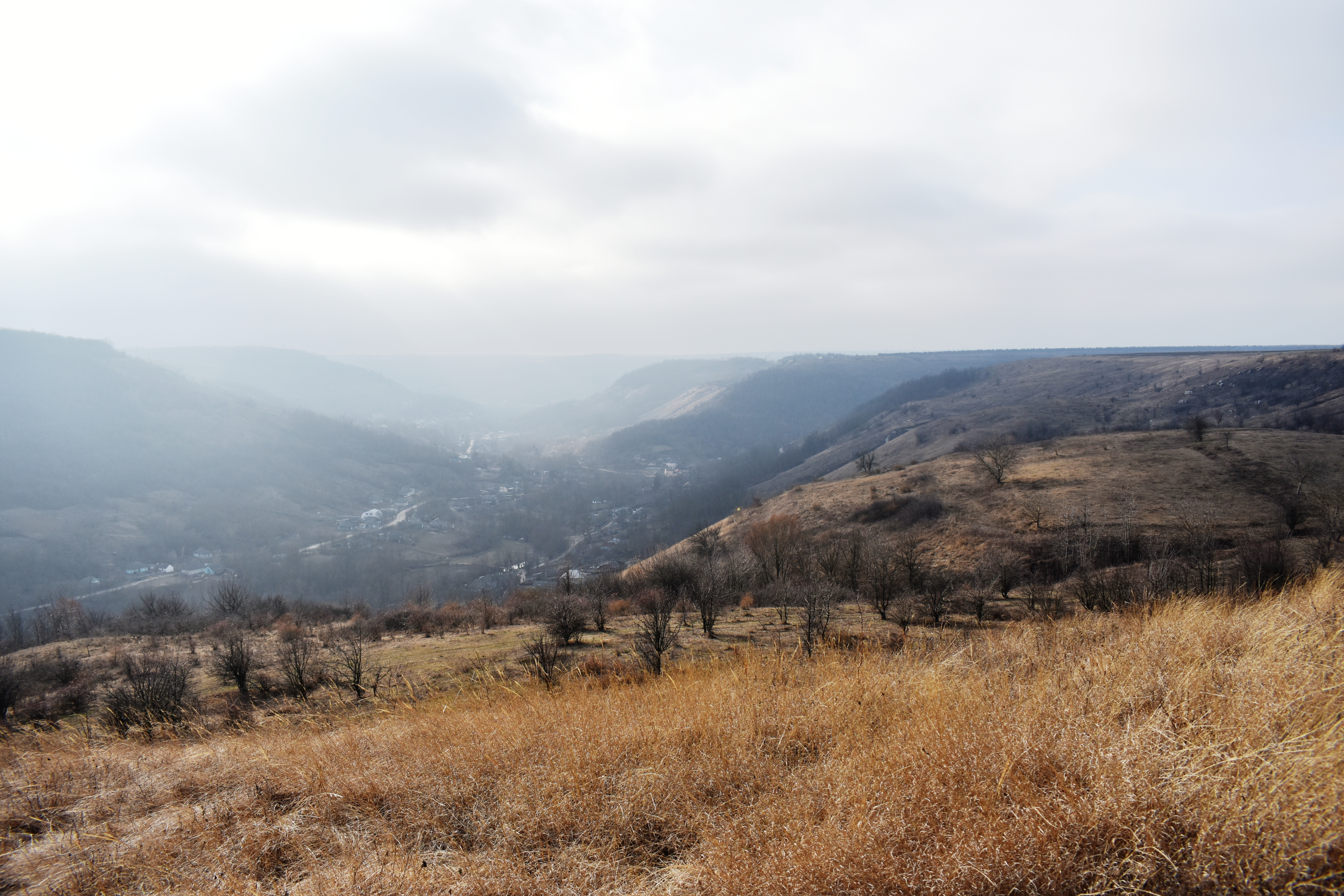 Долина Котлубаївки. Між селами Криштофівка і Григорівка Могилів-Подільського району Вінницької області